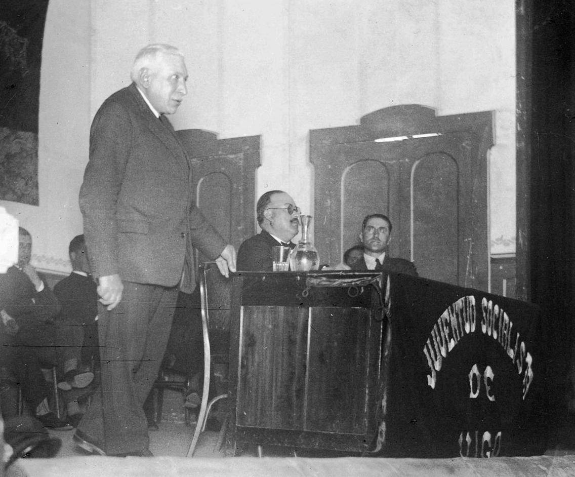 Enrique Heraclio Botana (de pé) e Emilio Martínez Garrido, Juventud Socialista de Vigo.